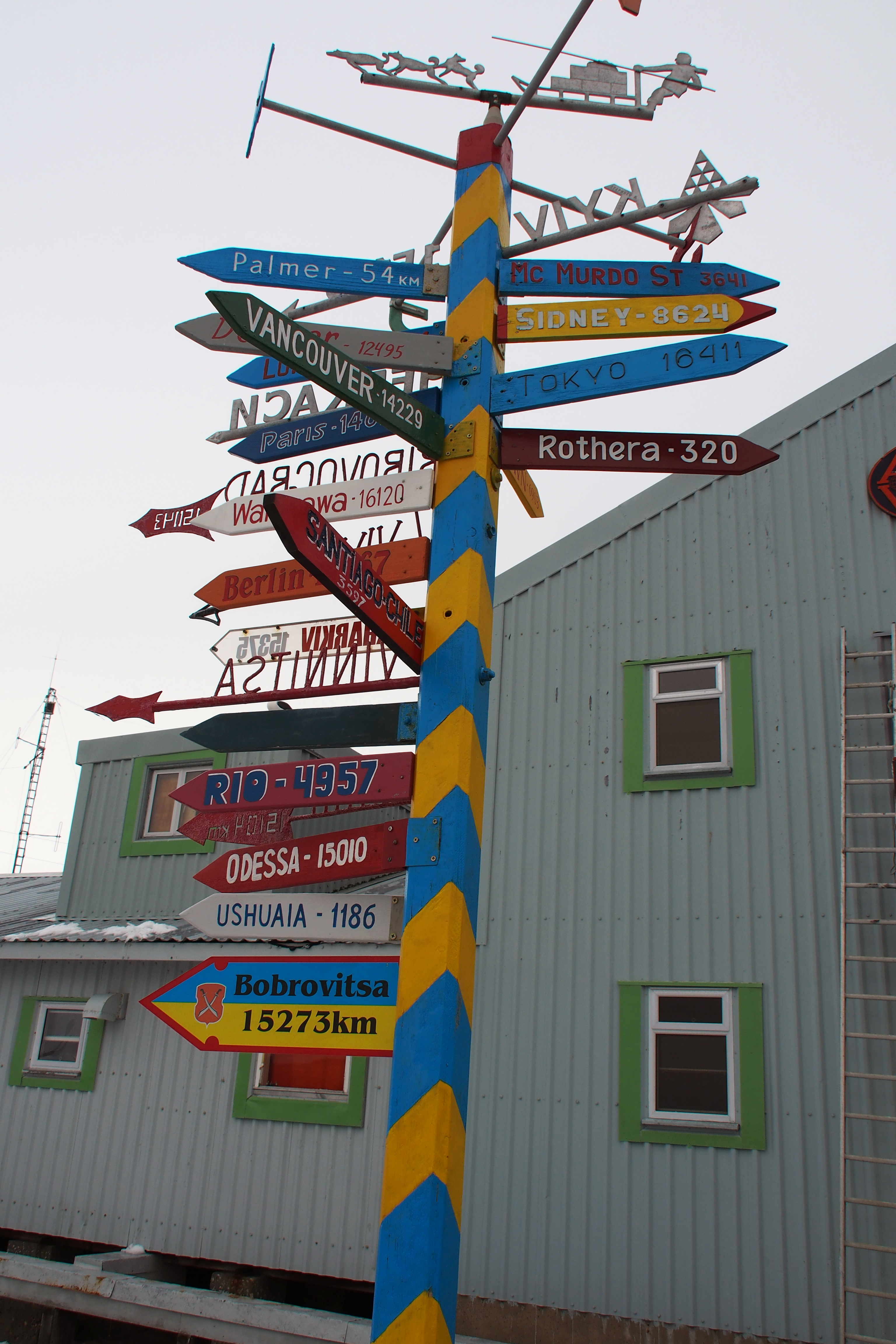 ベルナツキー基地 2016年投稿者撮影